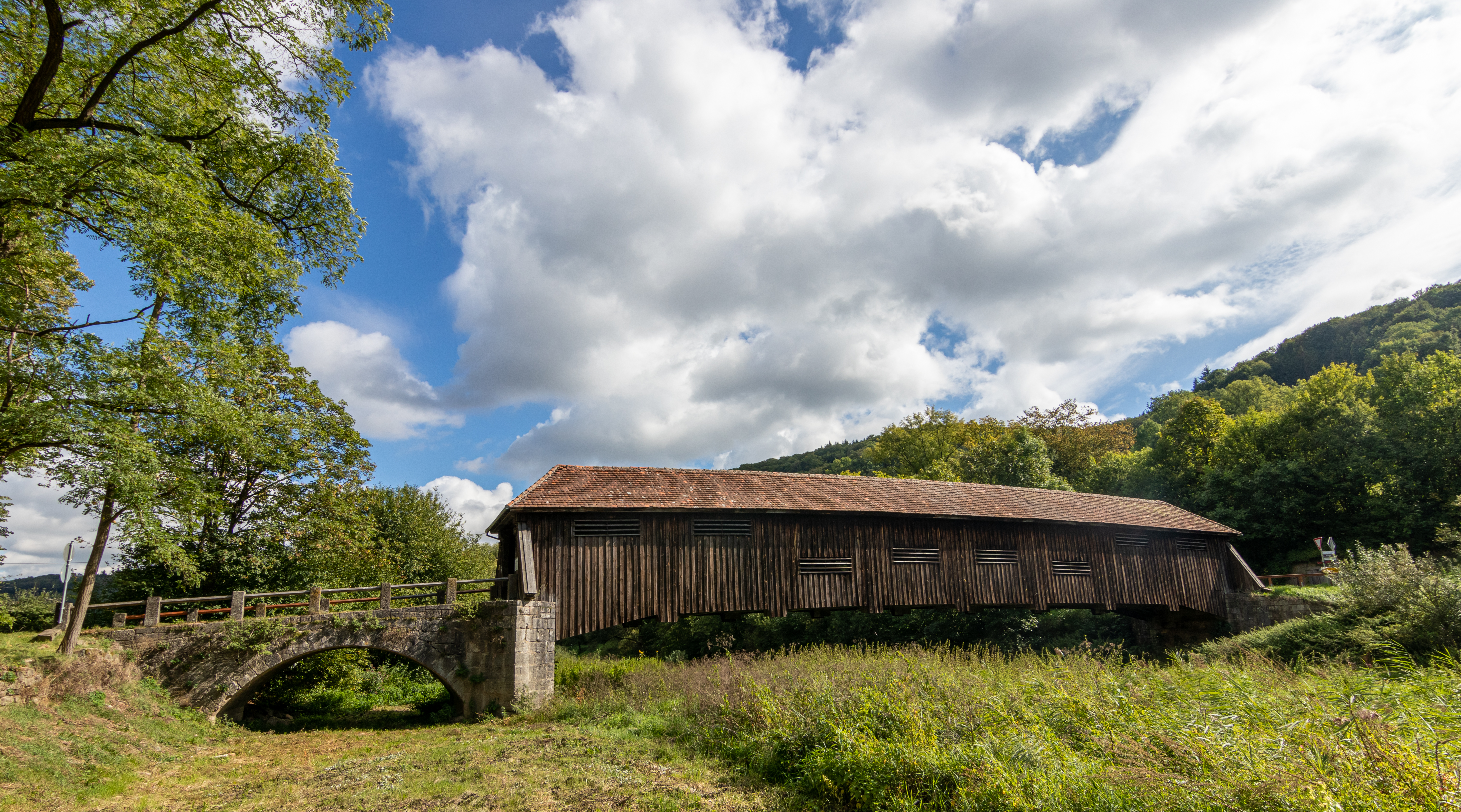 Die Archenbrücke Unterregenbach